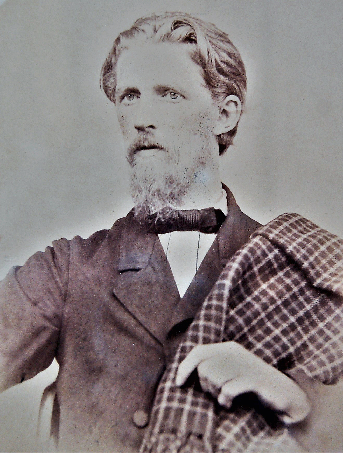 Porträt von Andreas Andresen